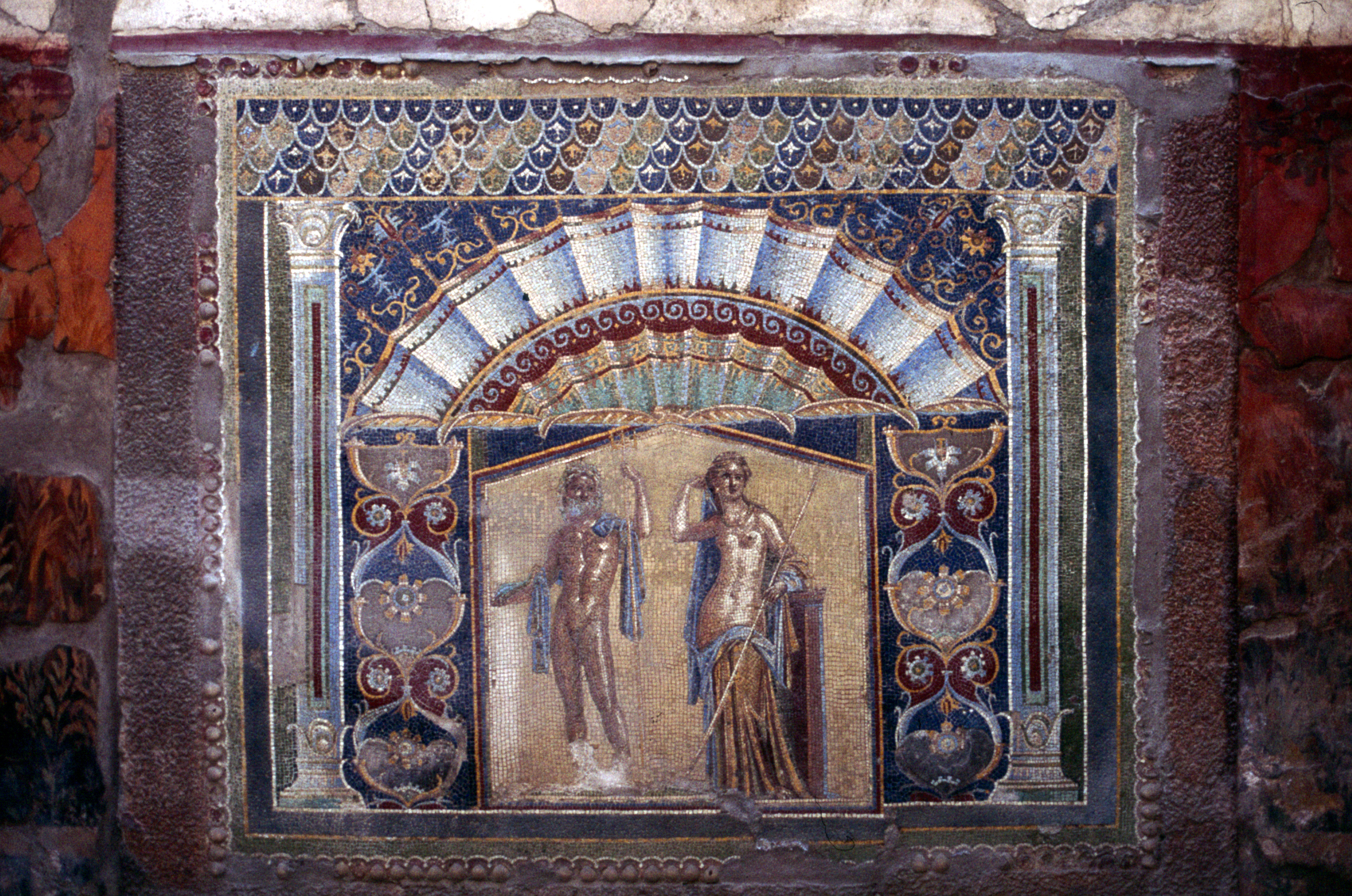 Herculaneum